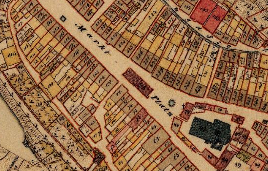 Plan von Auerbach (Oberpfalz)